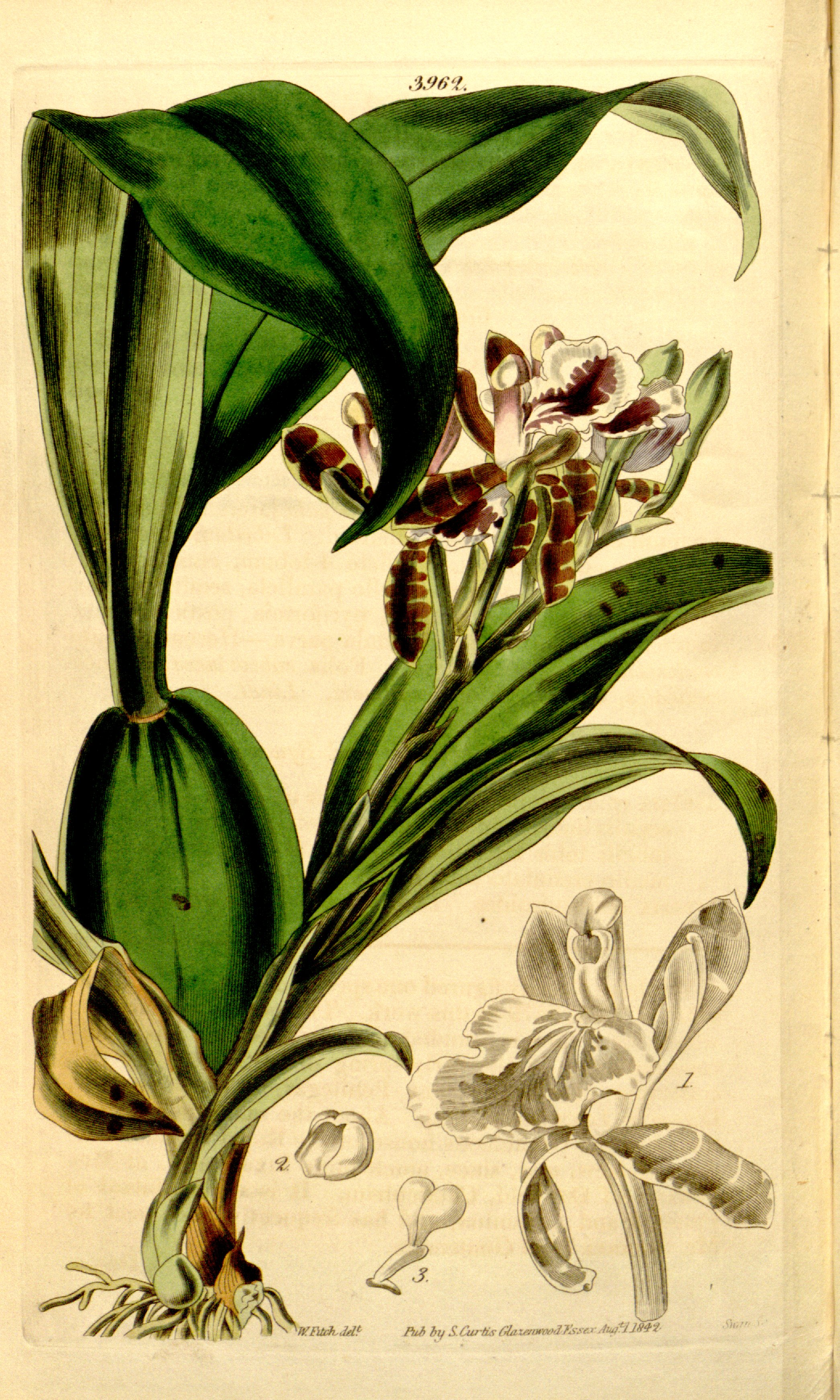 Illustration of Aspasia epidendroides